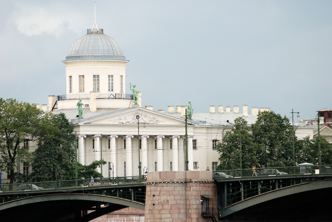 Pushkin House in St. Petersburg